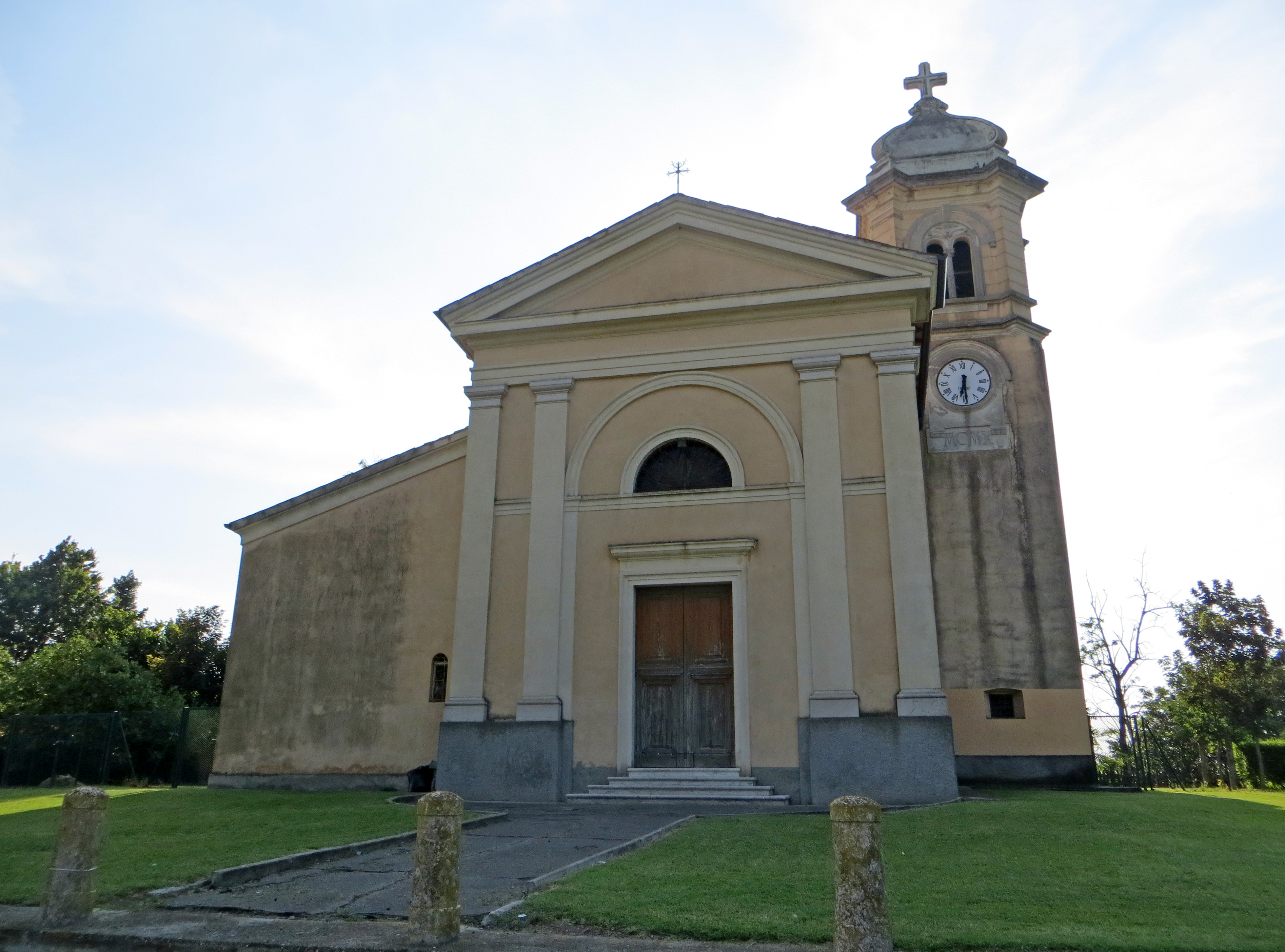 Chiesa di San Donnino (Monticelli Terme, Montechiarugolo) - facciata